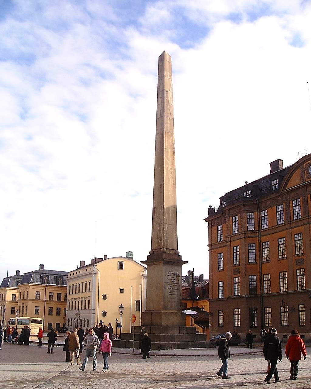 Obelisk at Slottsbacken, Gamla stan, Stockholm.